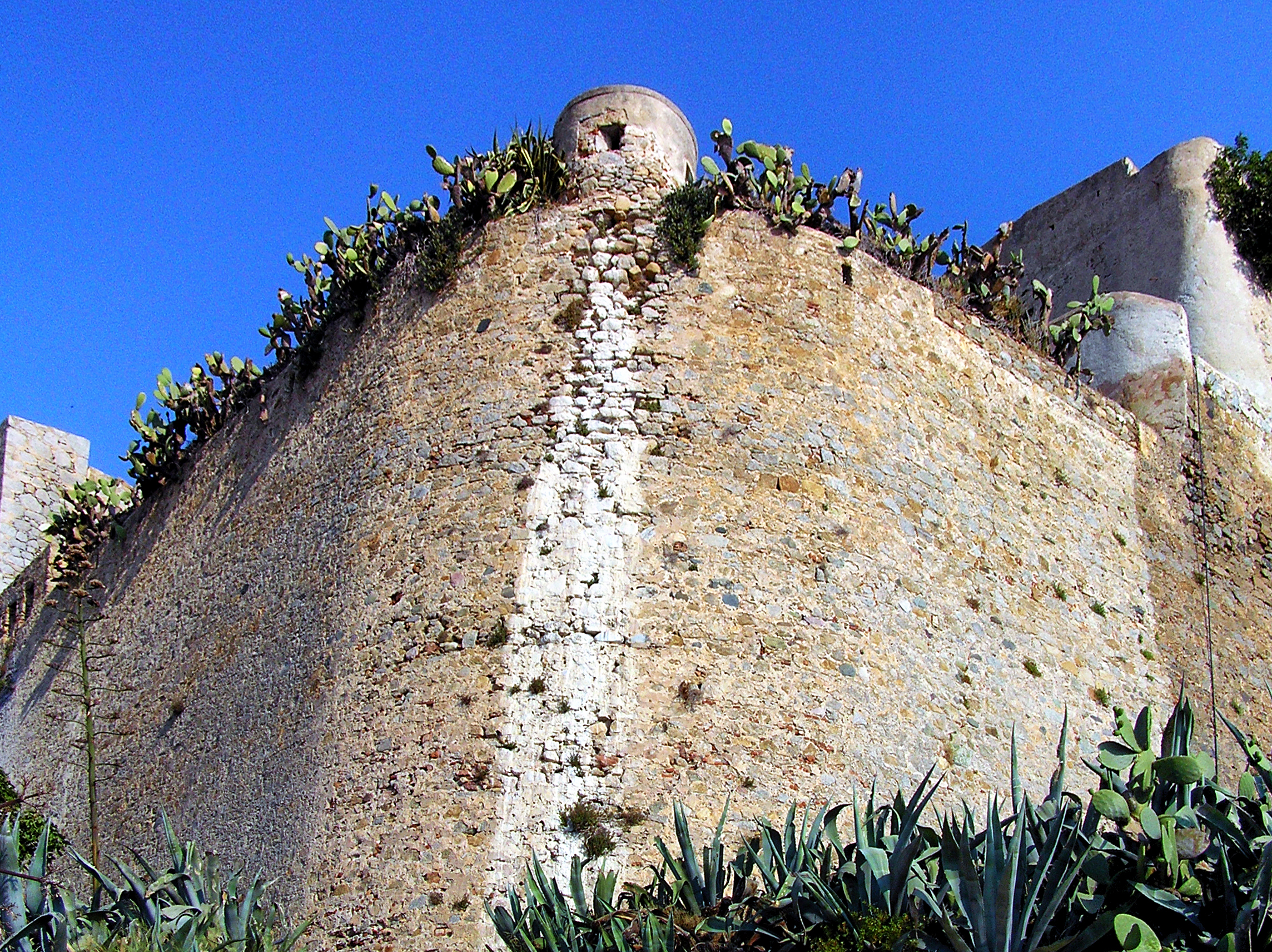 Calvi, Balagne (Corse) - La guérite au sud des remparts de la citadelle. La citadelle, son enceinte et la tour de Sel sont classés Monuments historiques